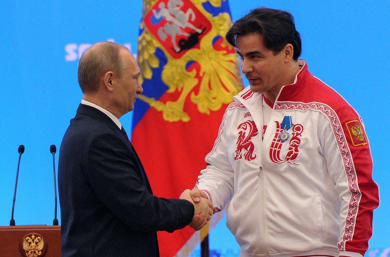 Орденом Почёта награждён двукратный серебряный призёр Олимпийских игр в санном спорте Альберт Демченко.